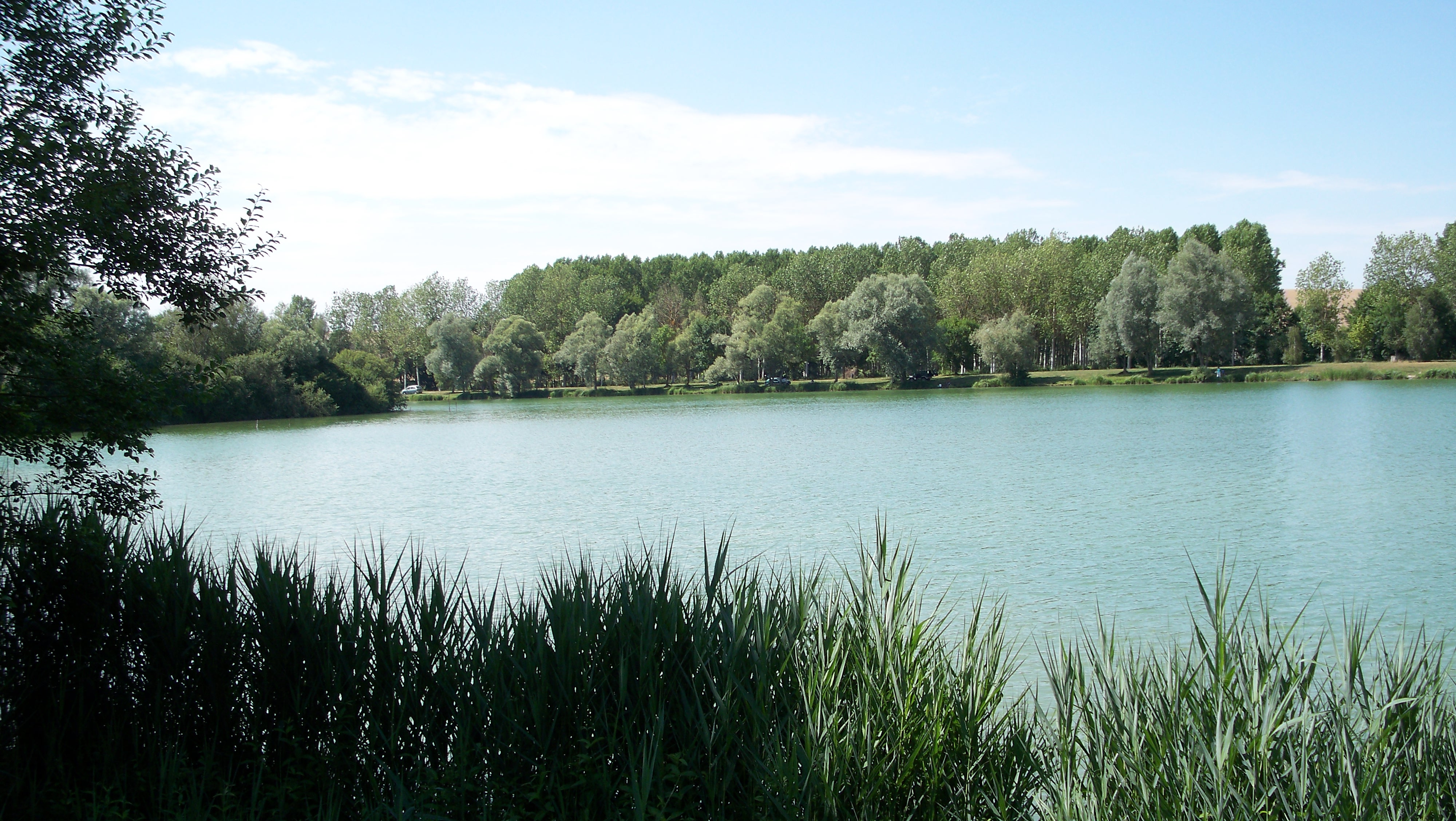 le lac de Paisy-Cosdon, dans l'Aube